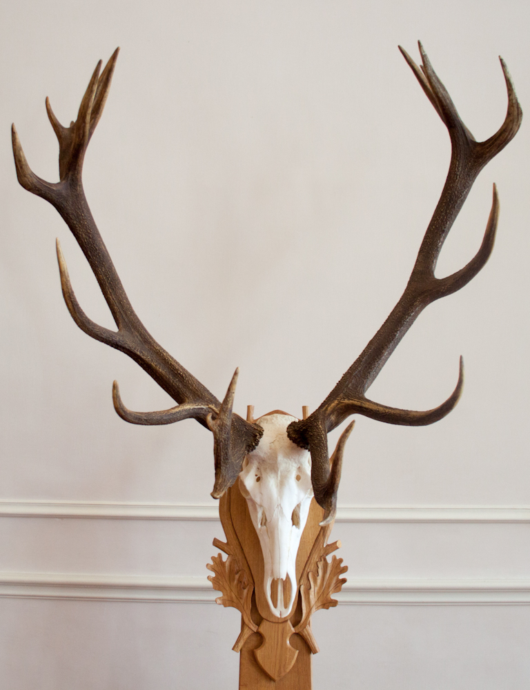 Szálka_-_22-pointer_stag, location - Szálka (Tolna county); hunter - Reinspach János; weight 11,25 kg; number of tine ends - odd 22 points (11/8); CIC points - 243,90 IPlabel QS:Len,"Szálka_-_22-pointer_stag, location - Szálka (Tolna county); hunter - Reinspach János; weight 11,25 kg; number of tine ends - odd 22 points (11/8); CIC points - 243,90 IP" label QS:Lhu,"Szálkai gímbika v. Szálkai 22-es, Szálka, Tolna megye, Reinspach János tömeg - 11,25 kg, ágak száma - páratlan 22 (11/8), CIC pontszám 243,90 IP"